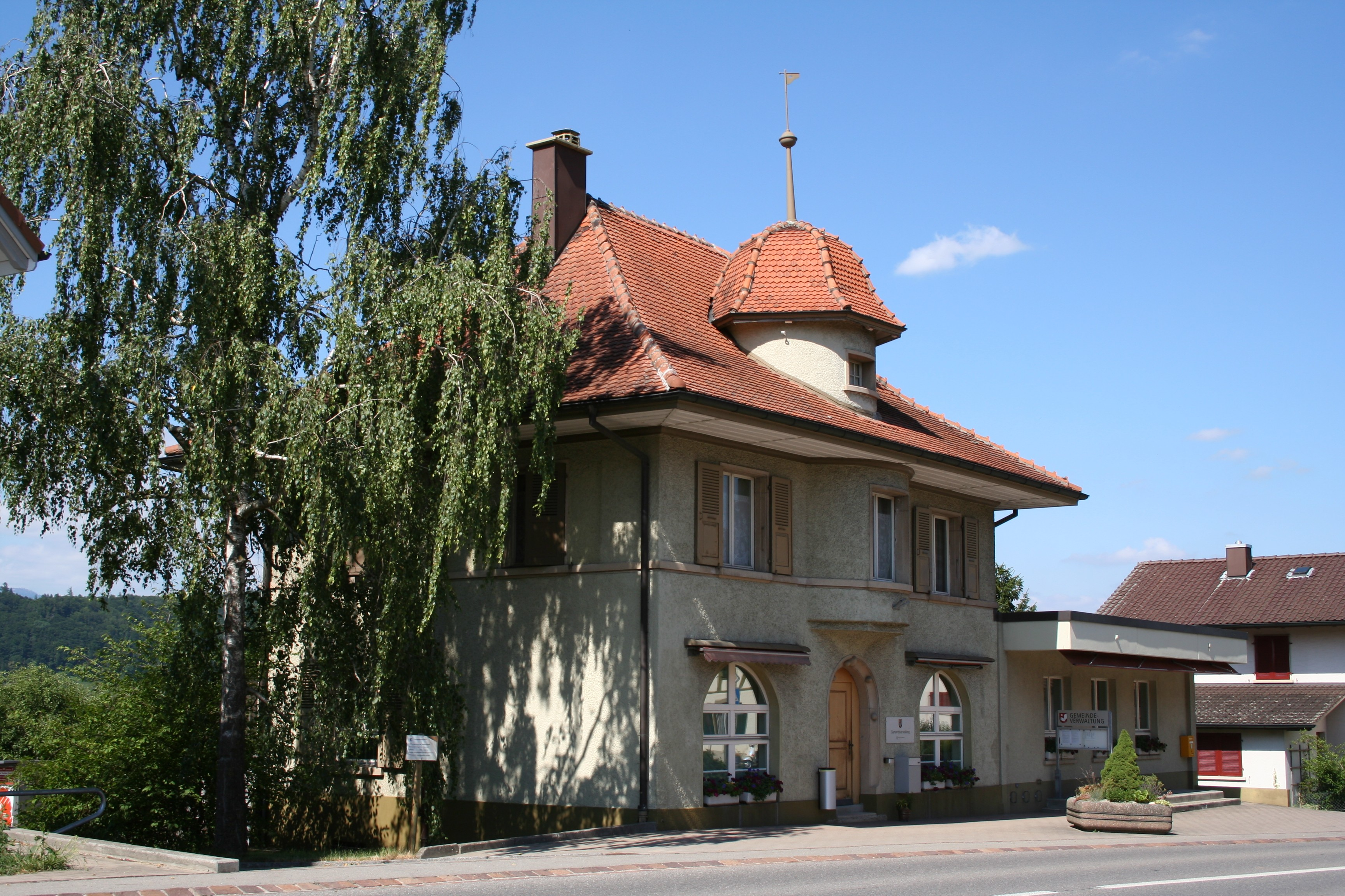 Das Gemeindehaus von Büetigen, Schweiz. Es liegt an der Hauptstrasse.